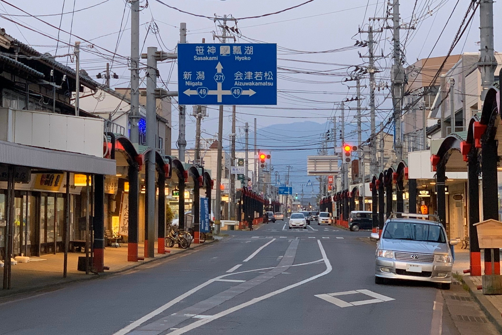 新潟県道271号水原出湯線 起点の「瓢湖入口」交差点を県道303号側から望む（新潟県阿賀野市，2020年4月）